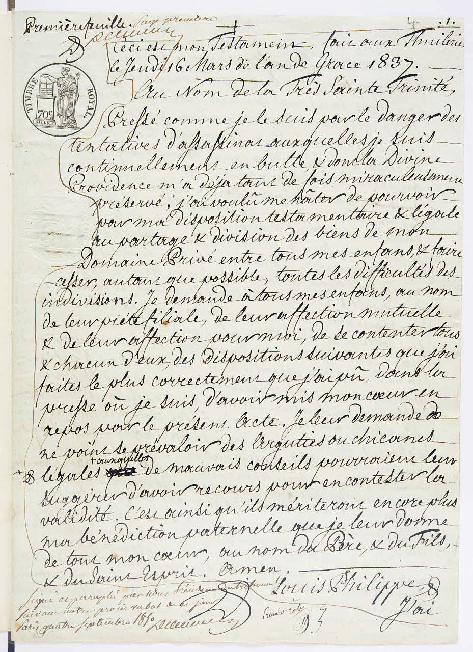 Testament olographe de Louis Philippe, première page